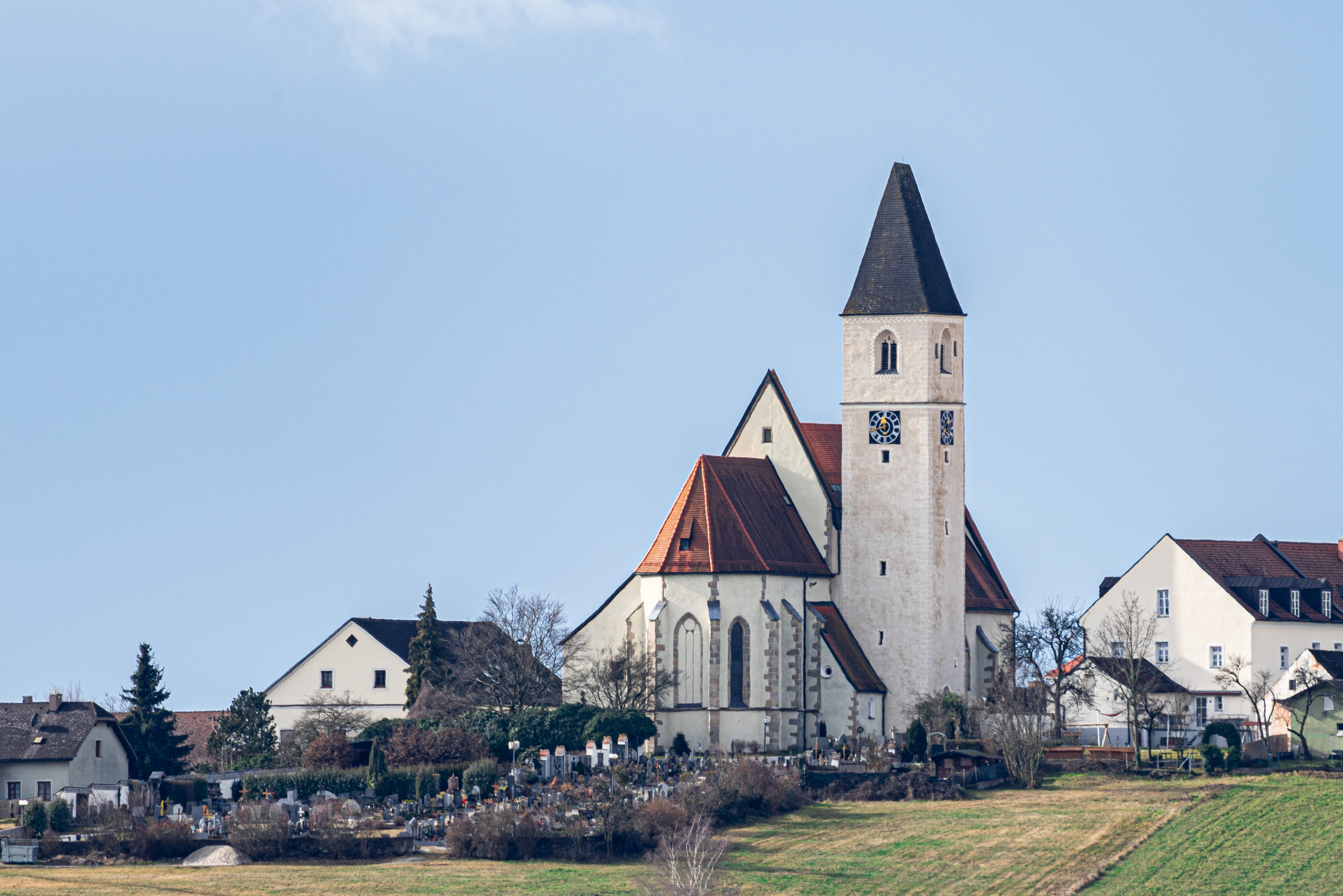 Kath. Pfarrkirche Mariä Himmelfahrt und Friedhof